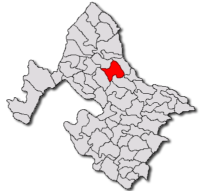 Categorie:Hărţi ale judeţului Mehedinţi